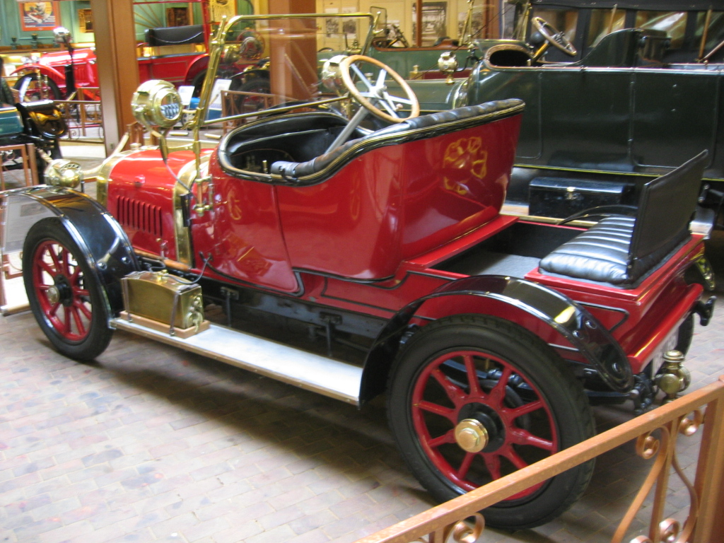 Peugeot Lion V4C3 - Musée Peugeot Sochaux